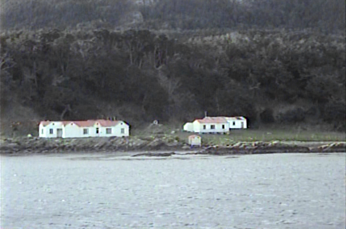 Estancia Remolino, frente al canal Beagle. Provincia de Tierra del Fuego, Antártida e Islas del Atlántico Sur, Argentina.